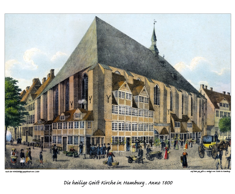 Die heilige Geist Kirche in Hamburg anno 1800, gezeichnet von Christoffer Suhr, Litho von Peter Suhr